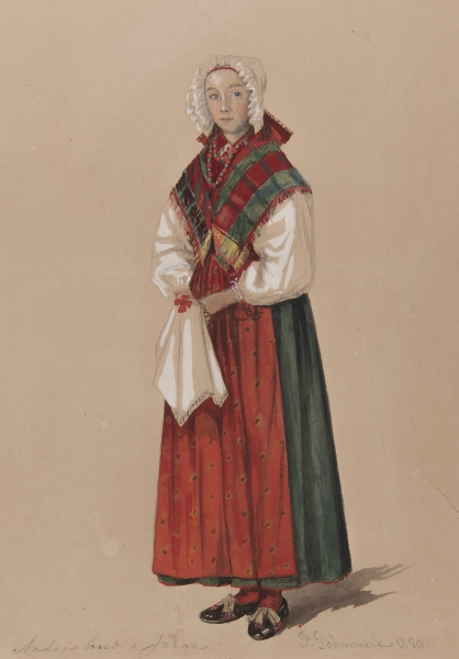 Annandagsbrud. Akvarell av P Södermark 1850. Depicted place: Q10541800 (Q10541800)